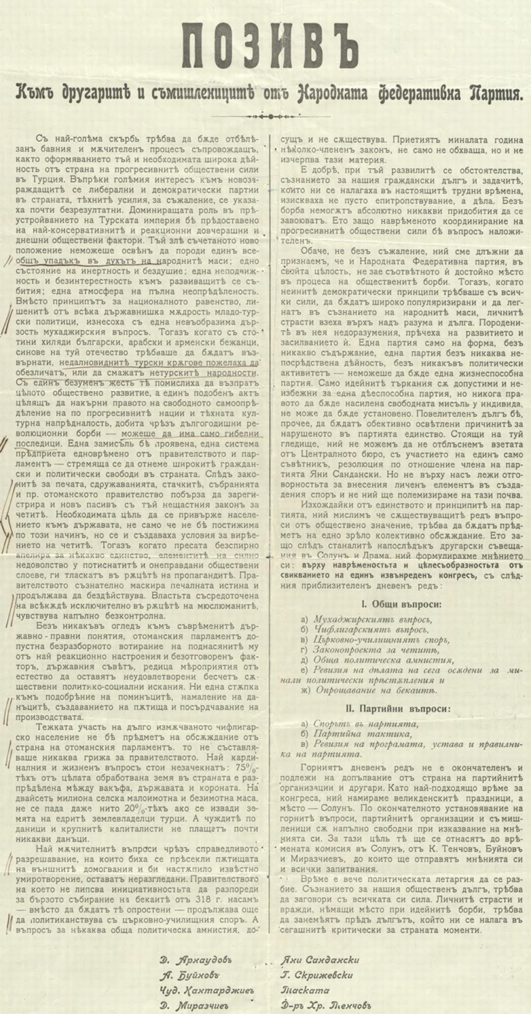 Позив към другарите от НФП